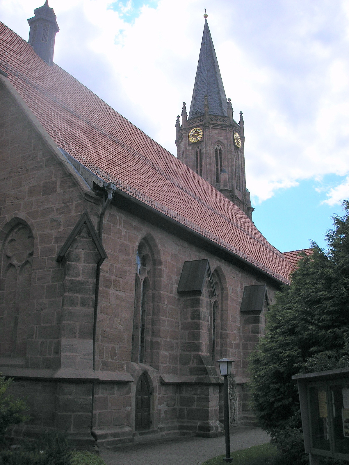 Die Kirche St. Aegidien in Heiligenstadt (Thüringen).